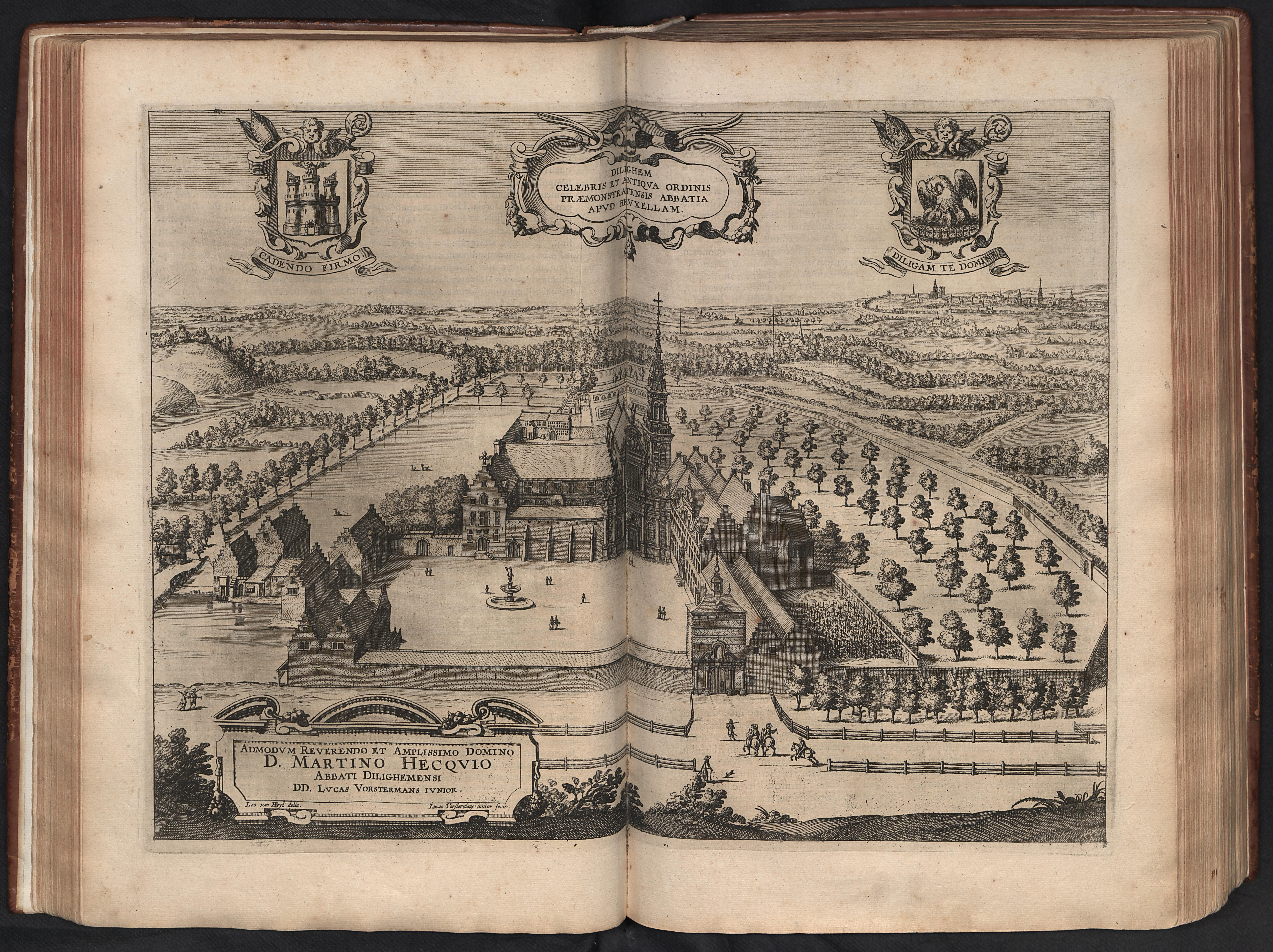 De Abdij van Dielegem in de 17e eeuw (afbeelding uit Chorographia Sacra Brabantiae van Antonius Sanderus - 1659)